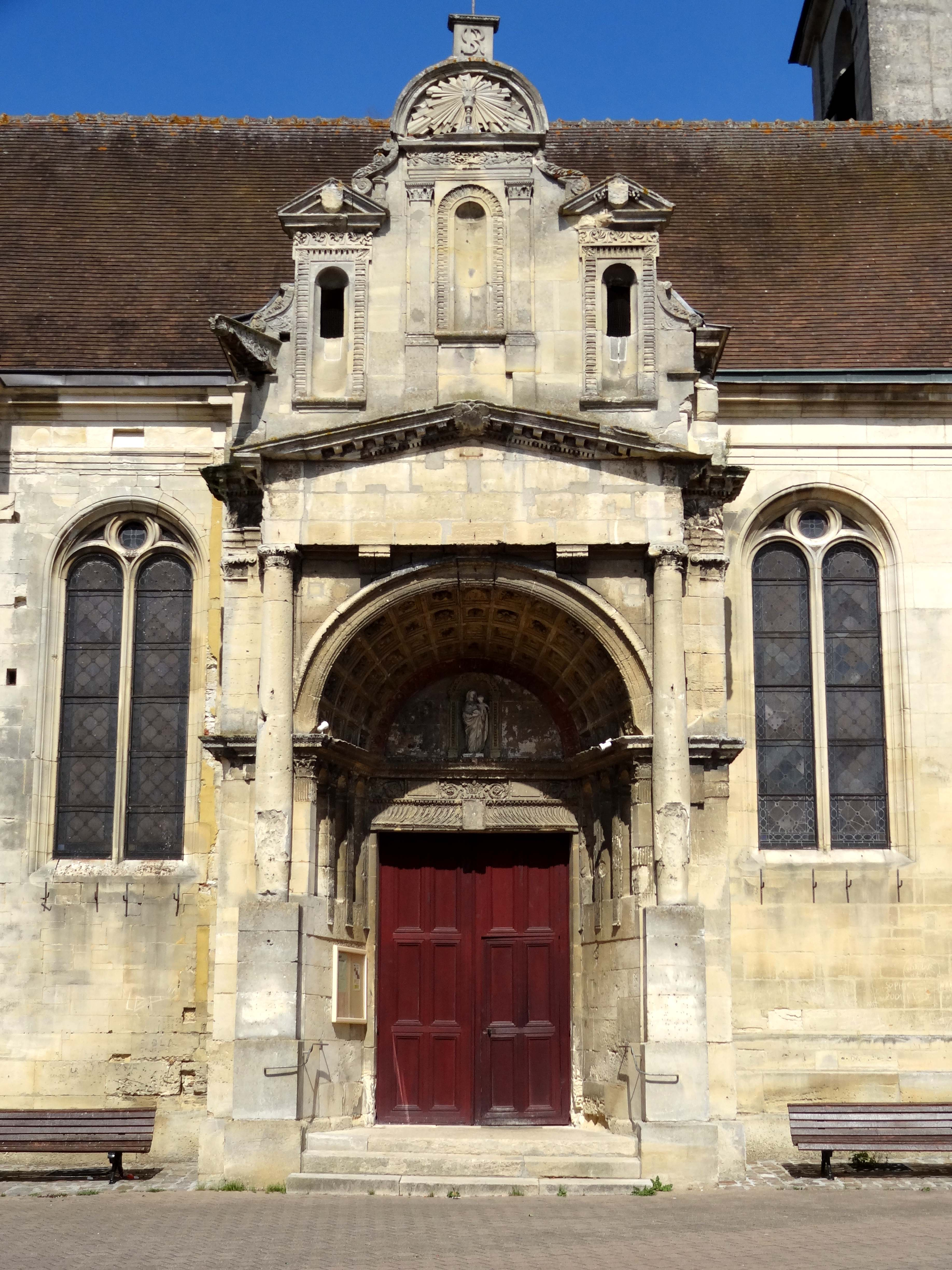 Église Saint-Rémi de Marines (voir titre).